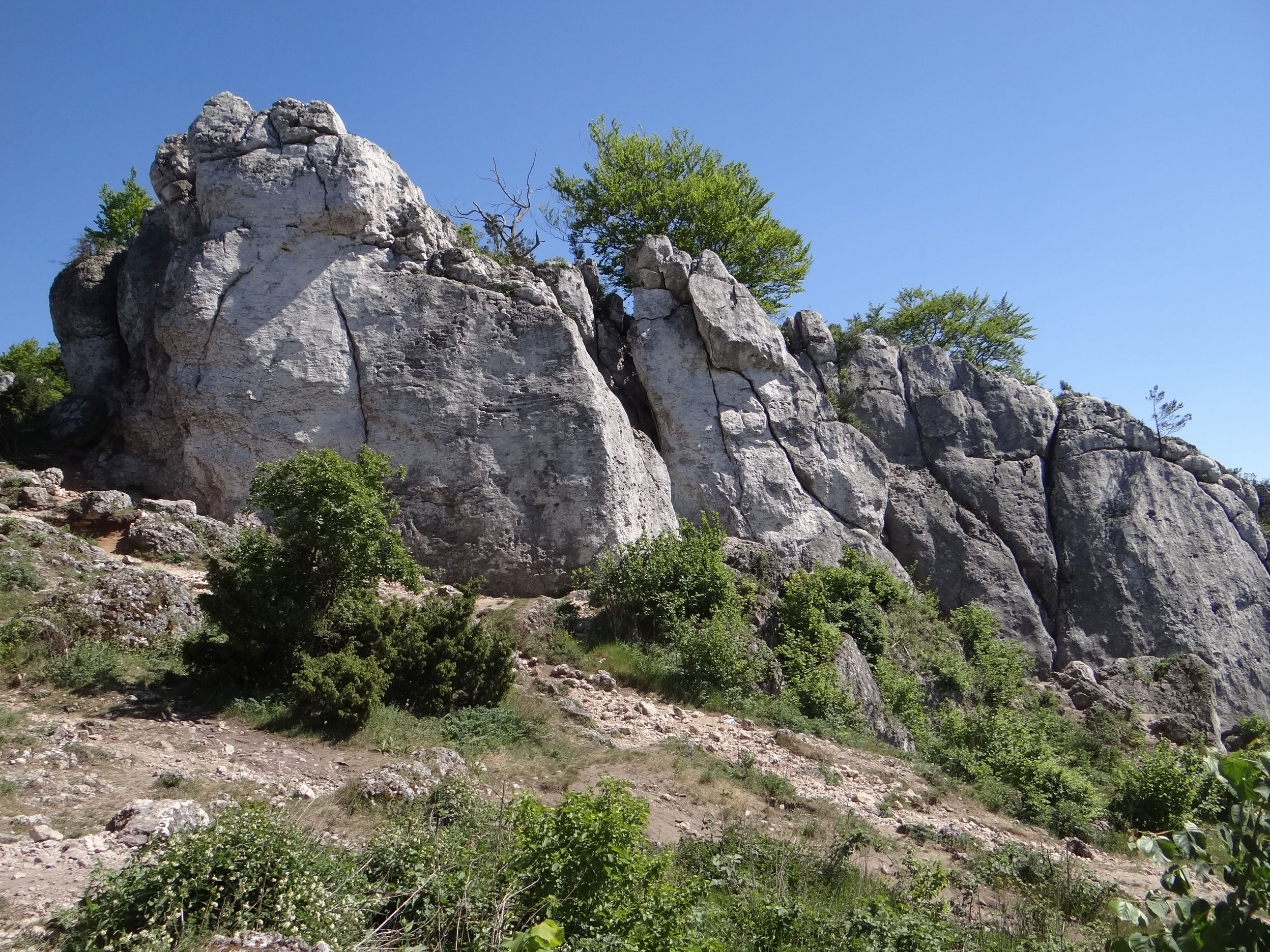 Długa Grań w grupie skał w rezerwacie przyrody na Górze Zborów